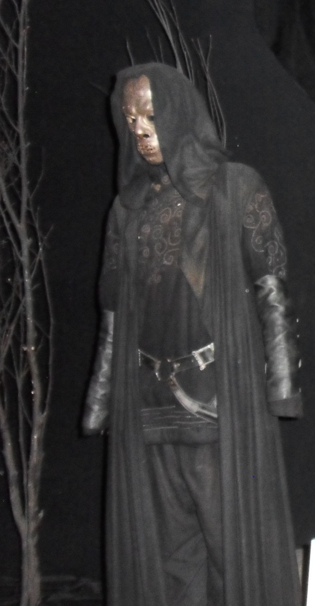 Costume de mangemort, Harry Potter Exhibition, Cité du Cinéma, Saint Denis (Paris) avril 2015